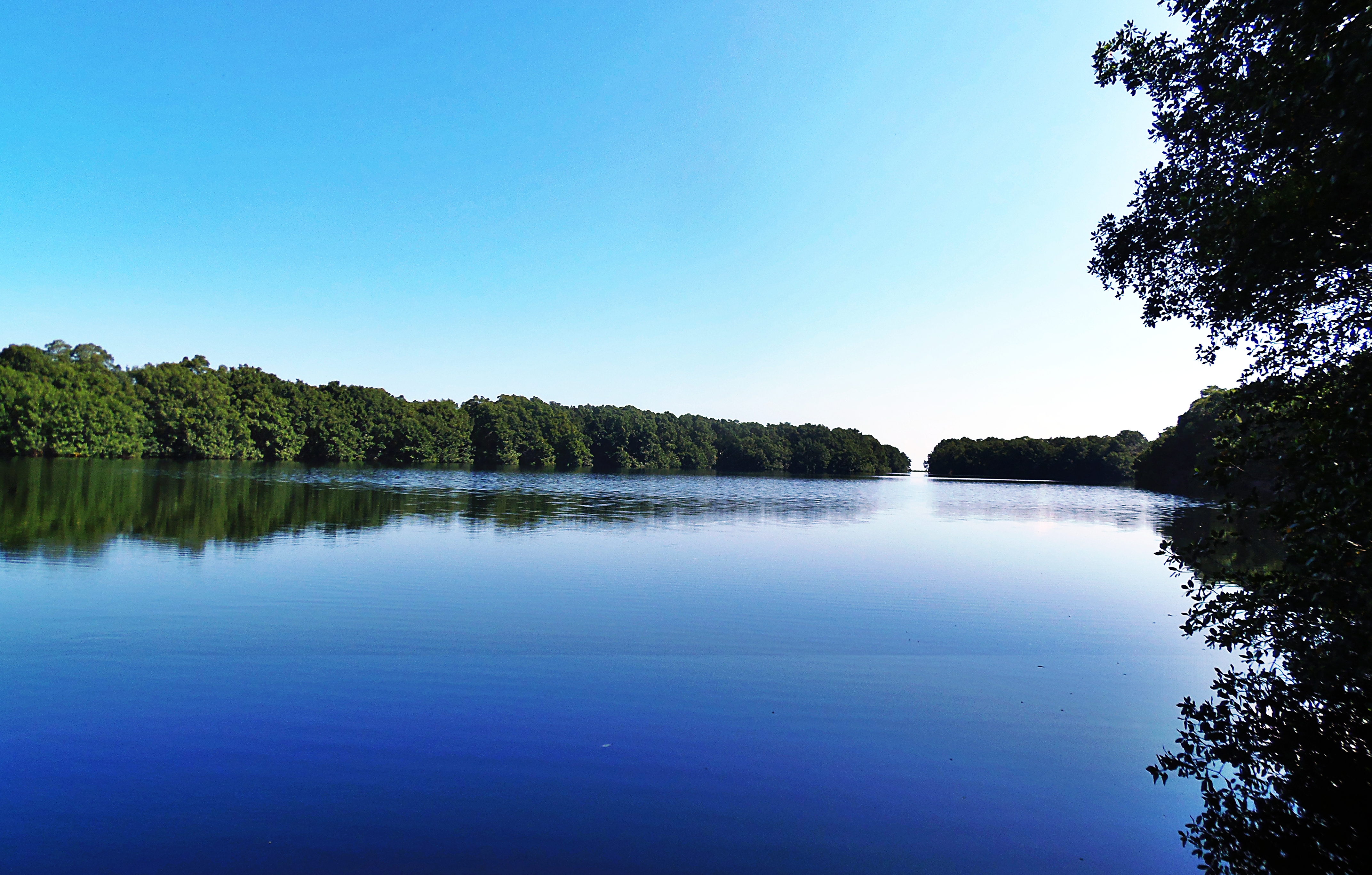 laguna cacao, Jutiapa Atlantida